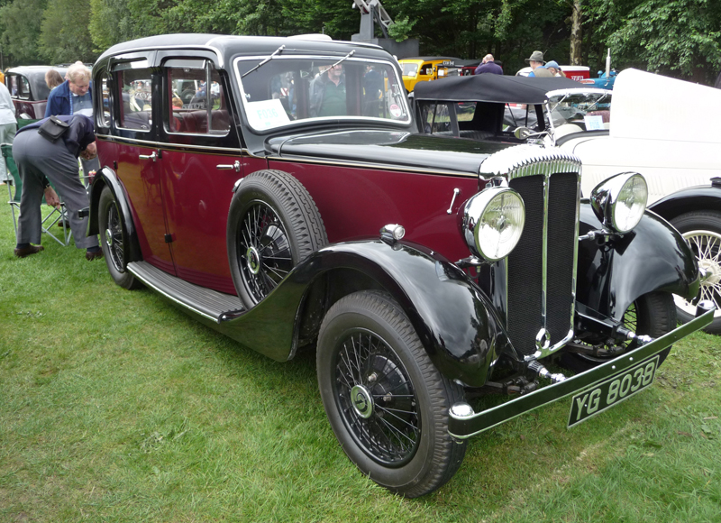 Daimler Fifteen six-light saloon (DVLA) 1939 cc, first registered 4 September 1934 "Hebden Bridge Vintage Weekend" Aug. 1st 2010